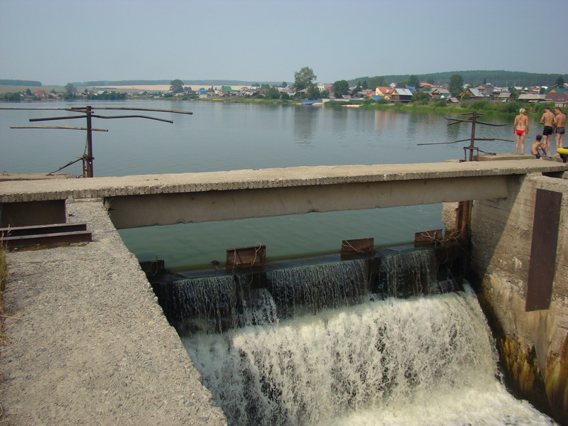 Плотина на реке Сысерть в деревне Черданцево